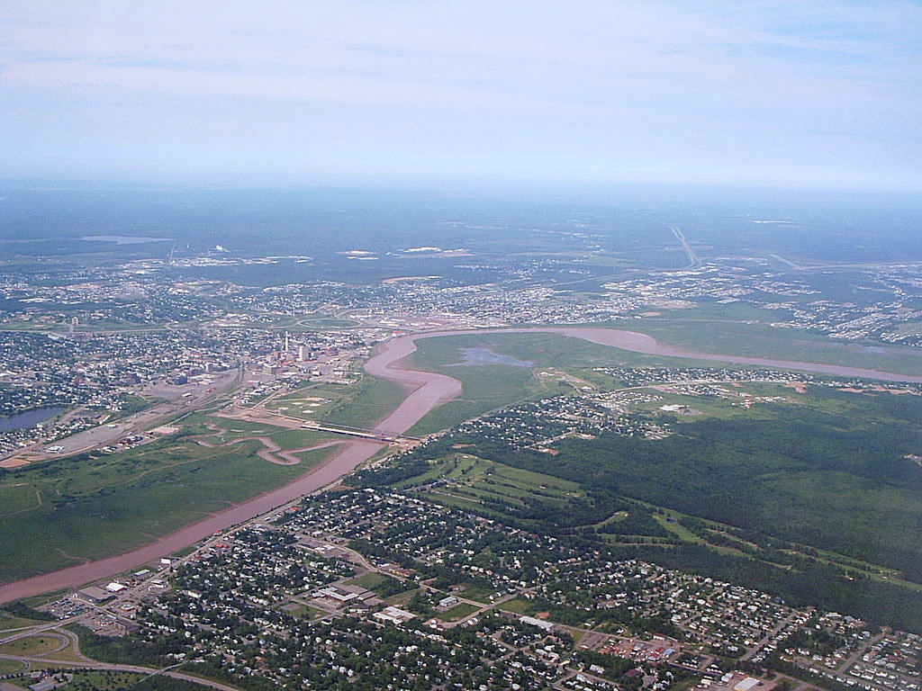 On voit la rivière Petitcodiac